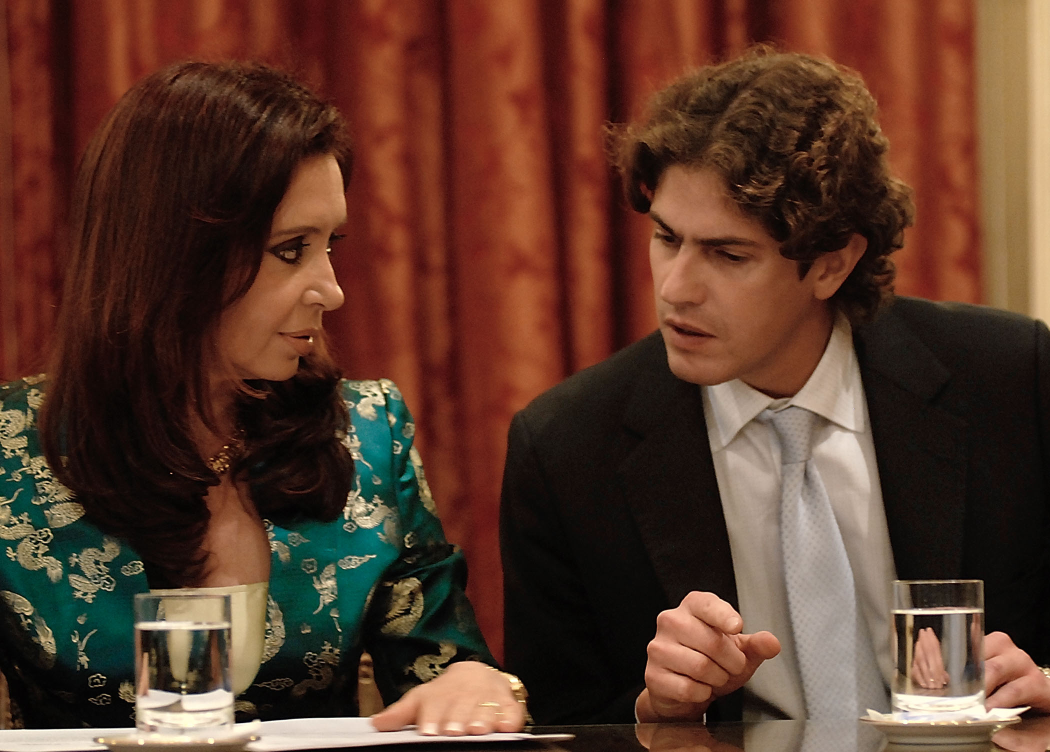 Martín Lousteau, como Ministro de Economía, junto a la Presidenta de la Nación.